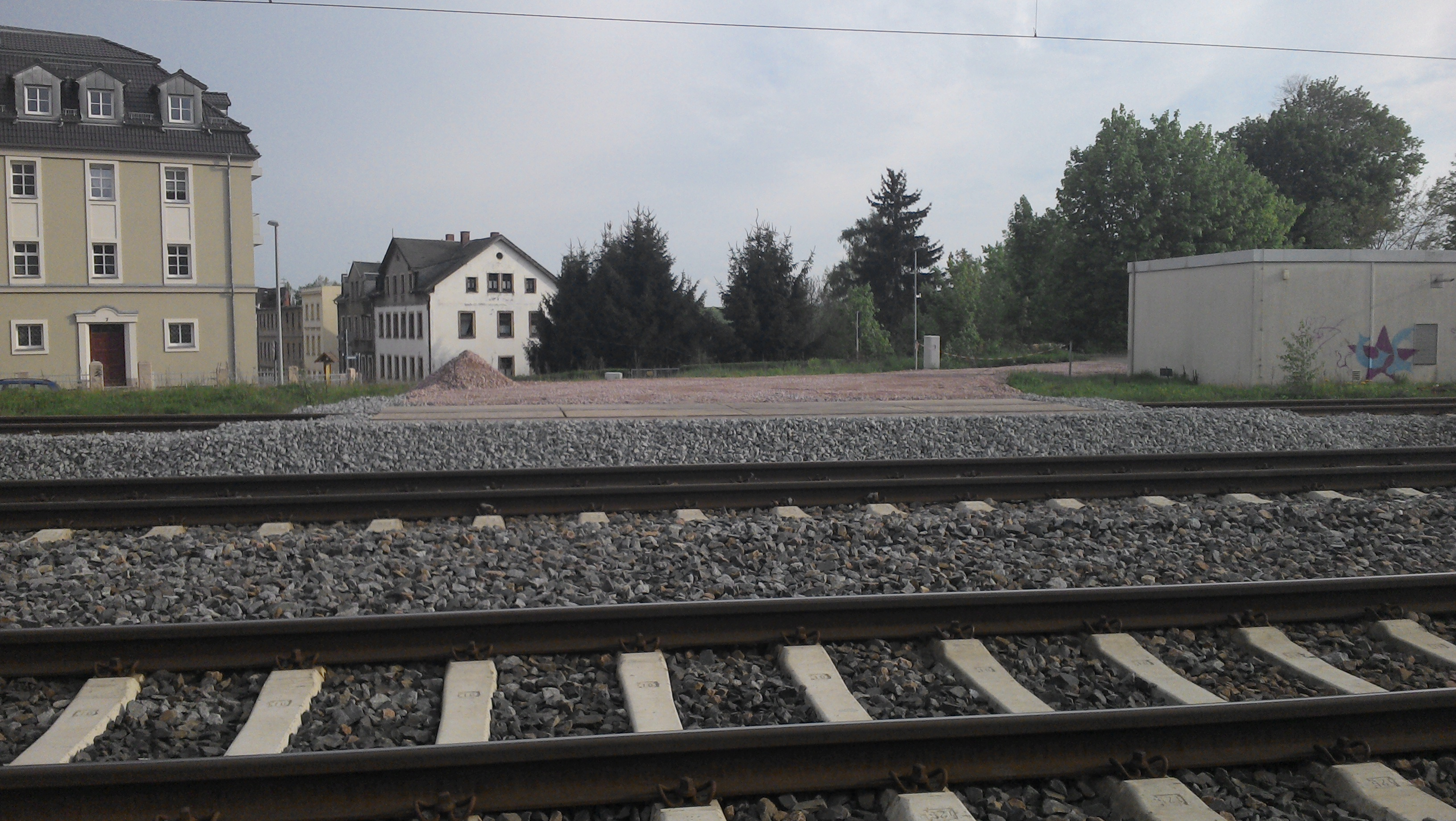 Eingleisstelle Hohenstein-Ernstthal